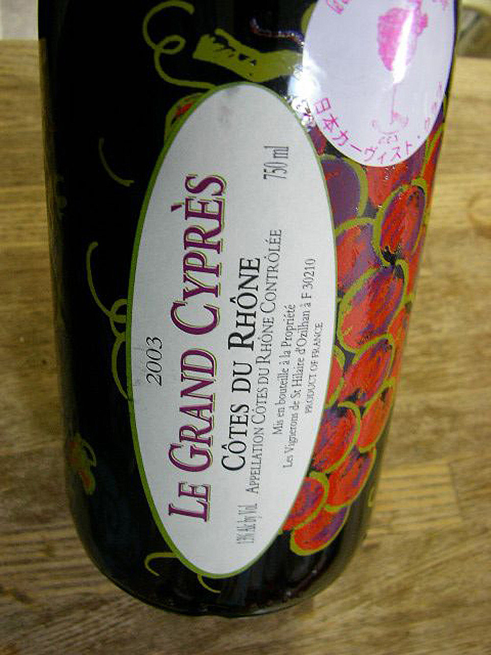 Saint-Hilaire-d'Ozilhan AOC Côtes du Rhône